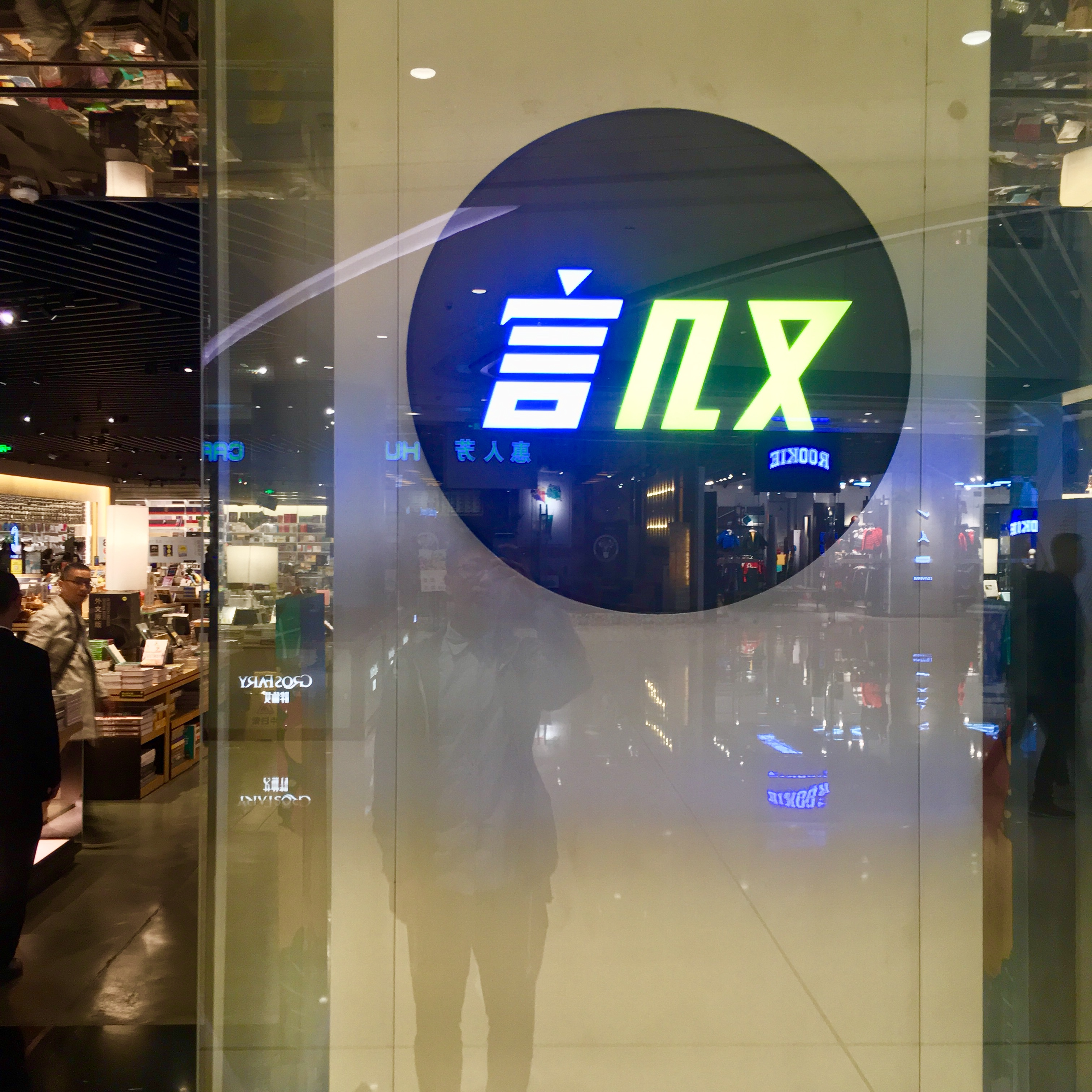 言几又书店logo